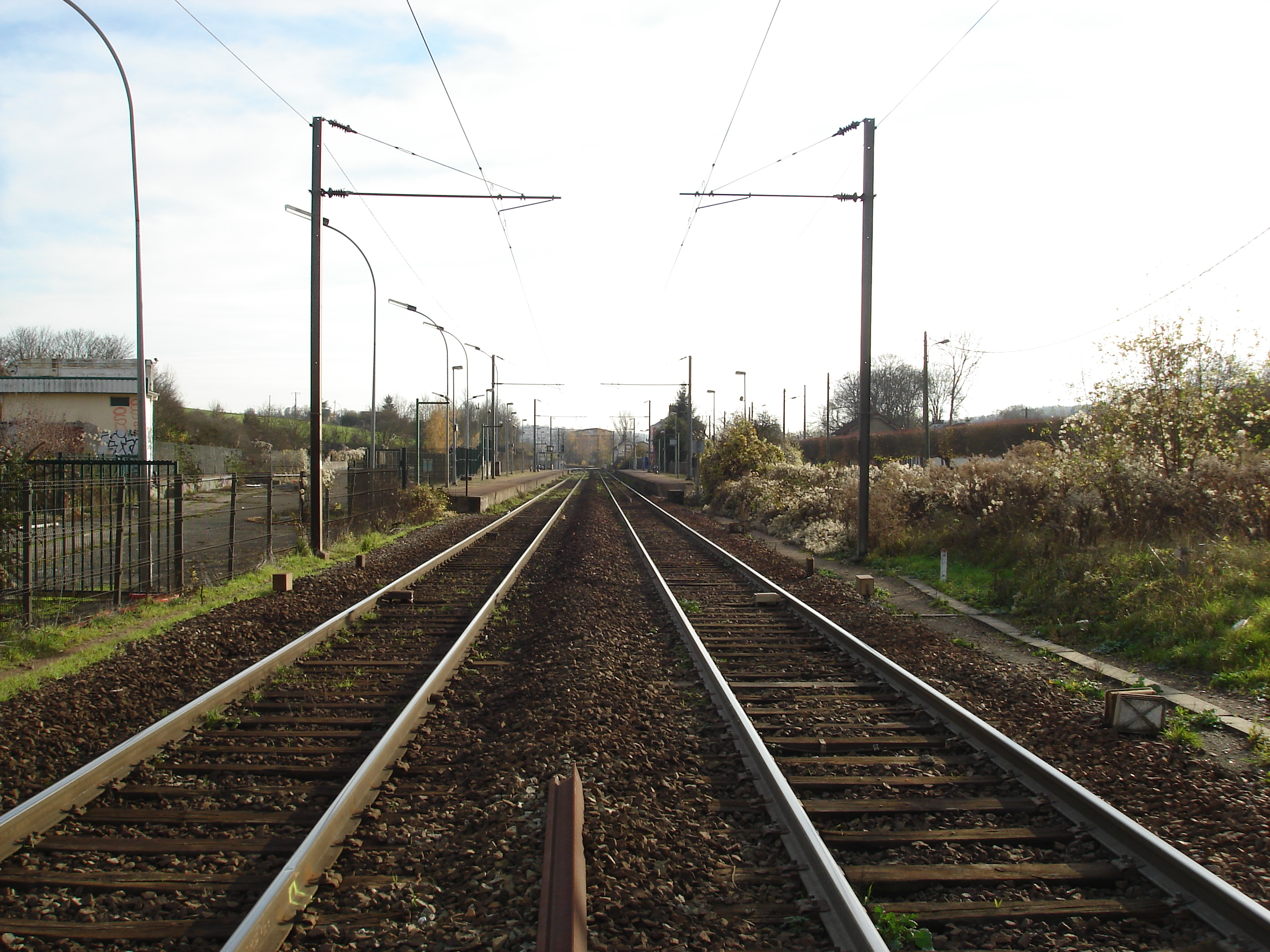 Gare de Beynes (78) : Vue générale de la gare.